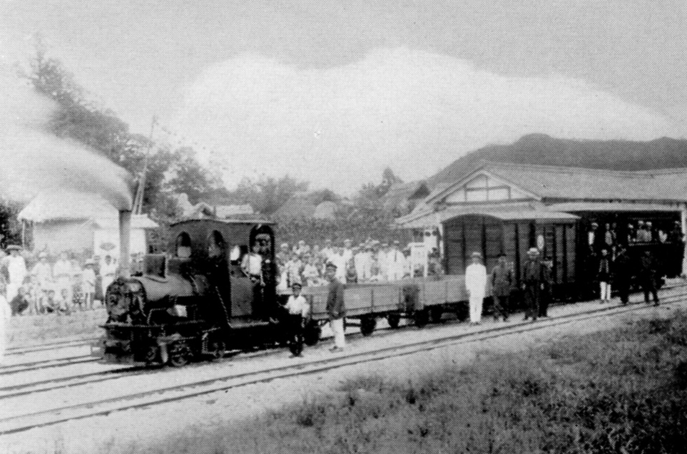 東濃鉄道の試運転列車――建物は今の御嵩口駅 （東美鉄道に譲渡）以前